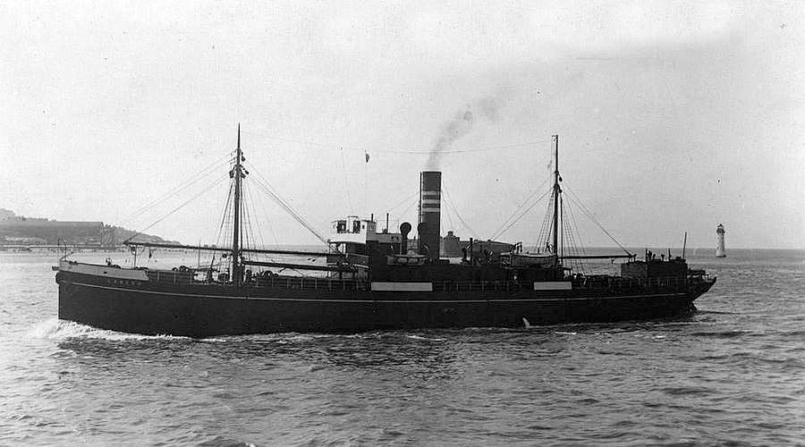 Imagen del SS Lancer (después llamado Stanbrook) en 1909.